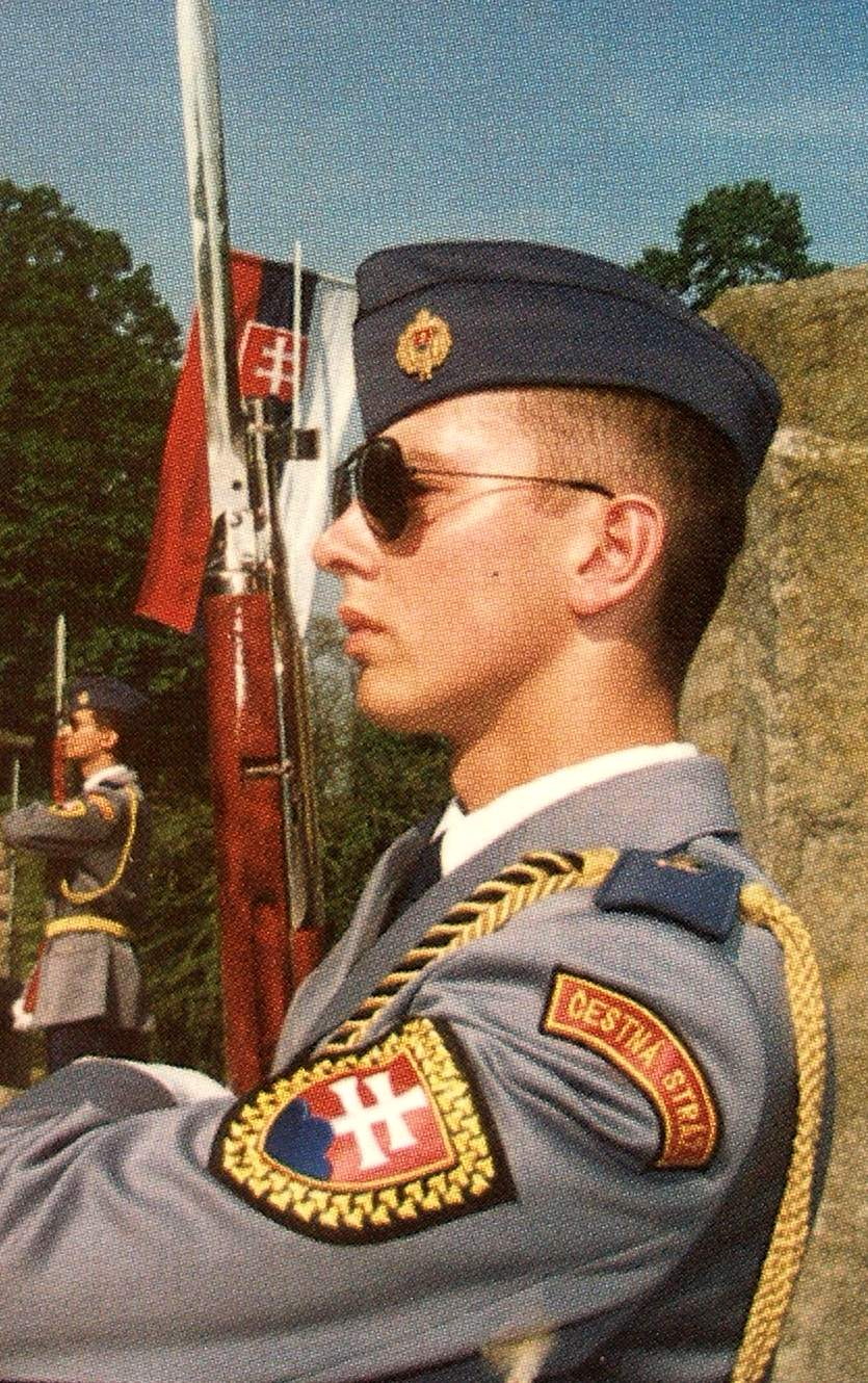 reprodukcia z ročenky Armády SR, vojak čestnej stráže